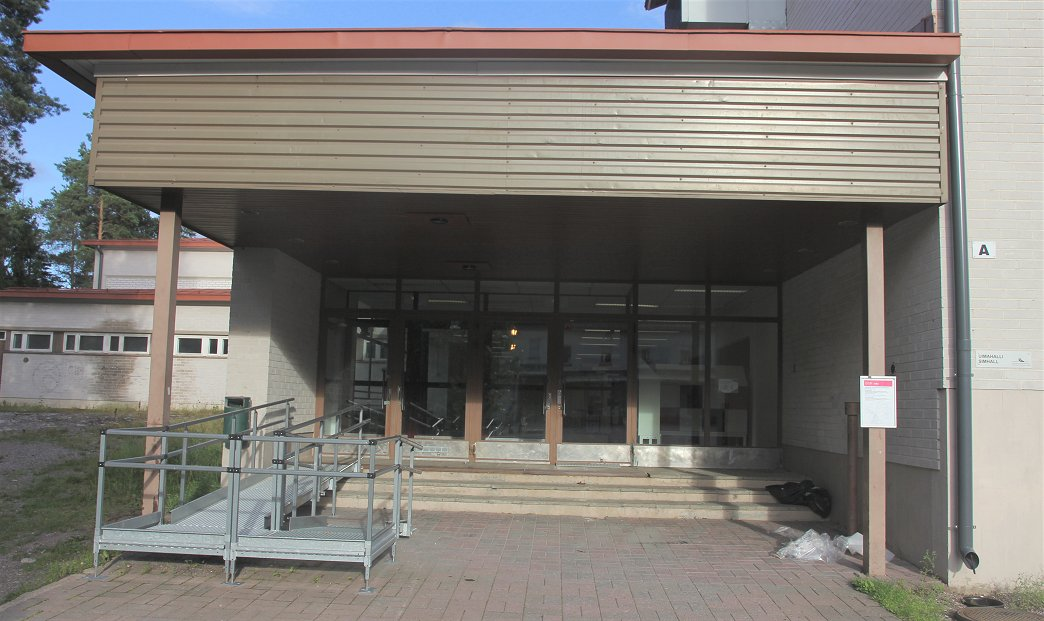 Sisäänkäynti Korson uimahalliin, joka toimii Korson koulun yhteydessä on Vantaan Korsossa.